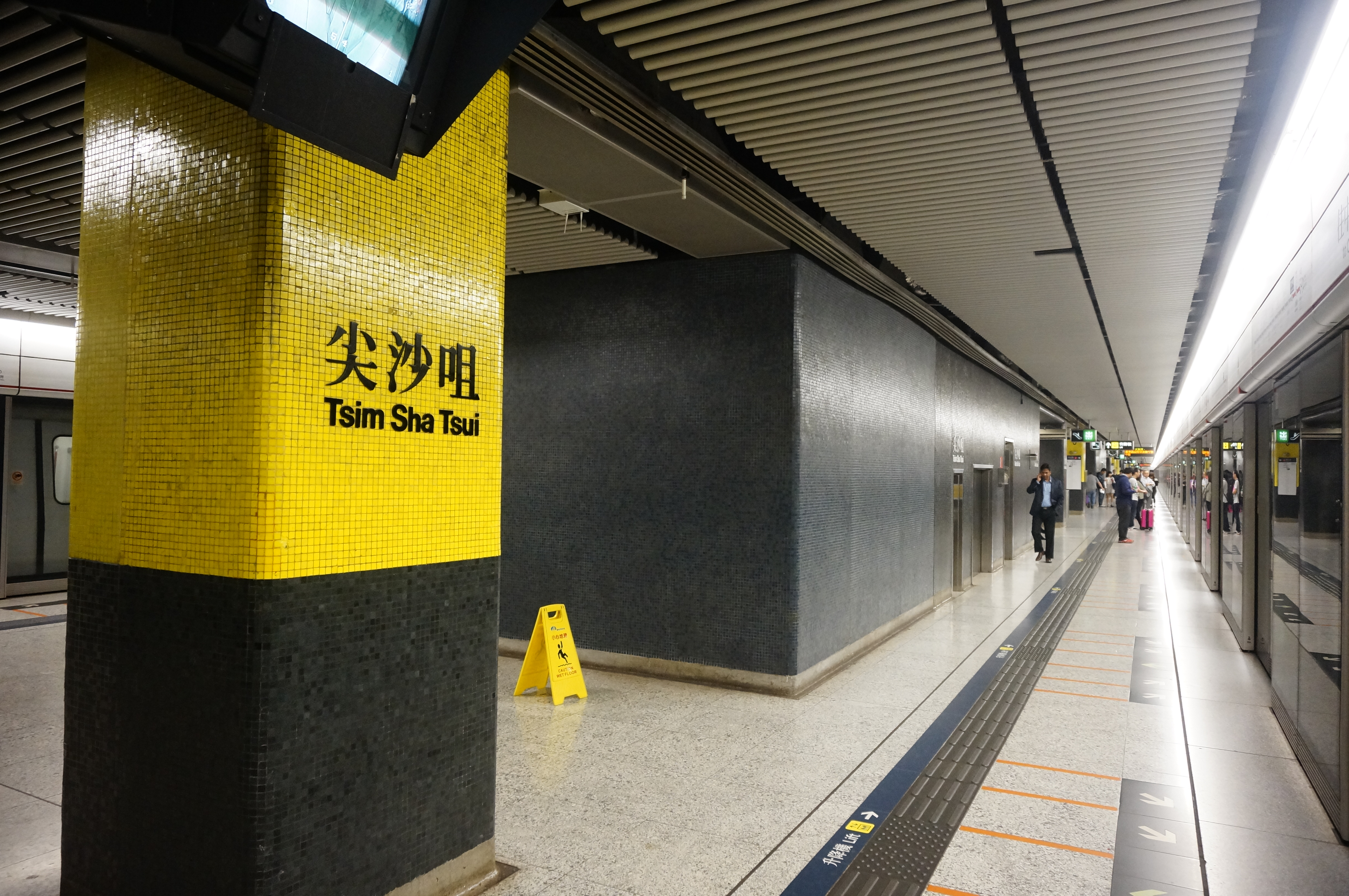 港鐵尖沙咀站月台